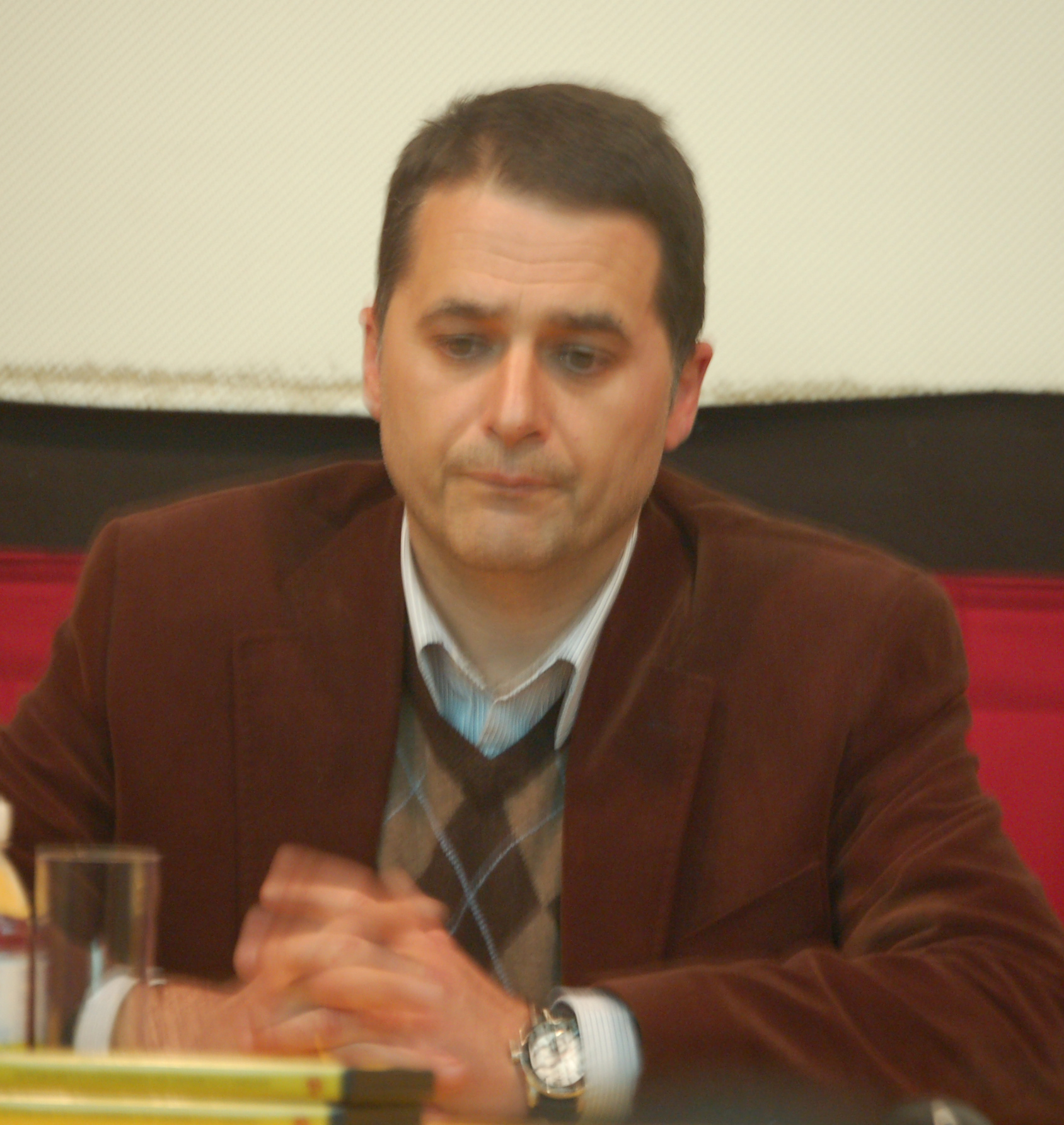 Carlos Alberto Montes Marqués, alcalde do Carballiño entre 2005 e 2009, polo PSdeG-PSOE